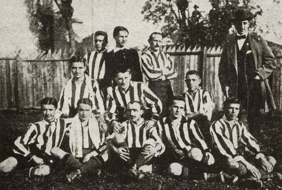 Una formazione della Juventus nella stagione 1913-14. Da sinistra, in alto: A. Arioni (I), R. Montano, Fuller; al centro: P. Omodei Zorini, L. V. Bona, E. Boglietti (I); in basso: C. Payer (I), Marchisio, C. Bigatto (I) (capitano), B. Dalmazzo, R. Boglietti (II).